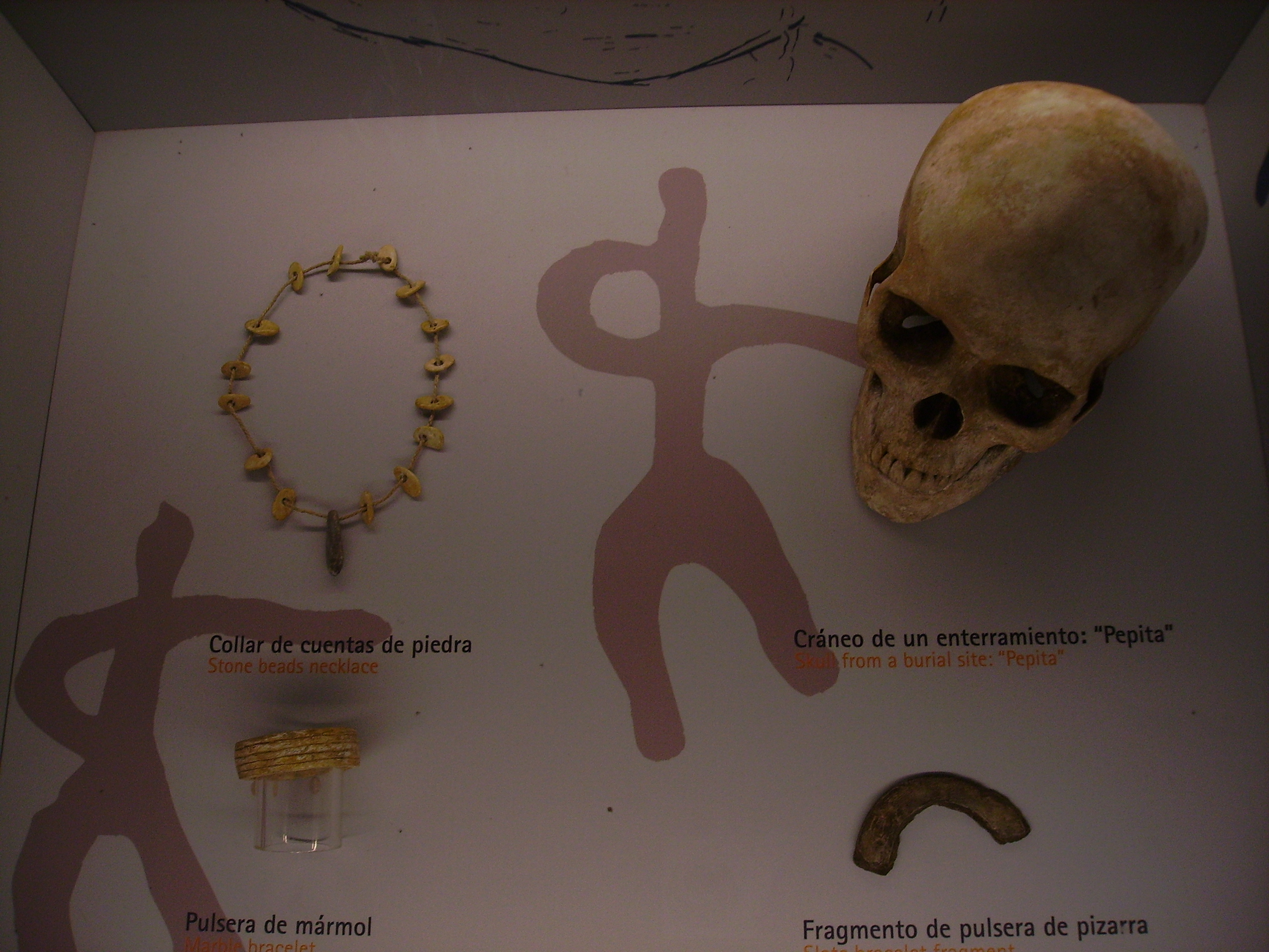 Cueva de Nerja